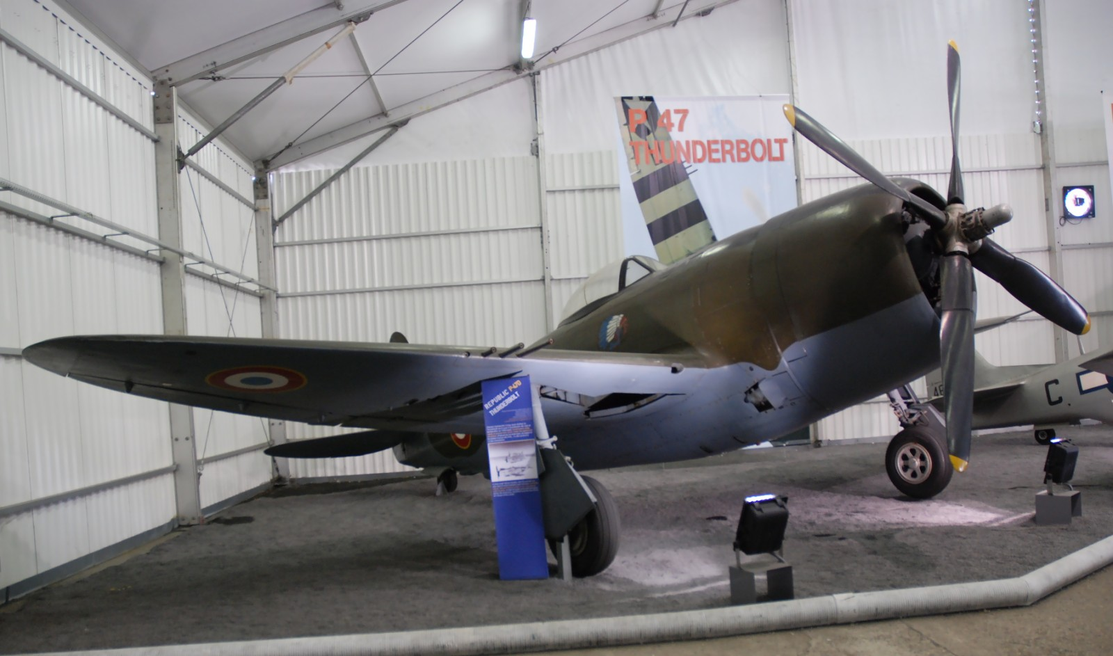 P-47D at Musée de l'Air et de l'Espace